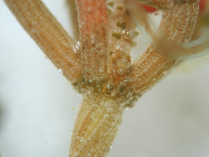 Geweih-Armleuchteralge Chara tomentosa, Astqirl, Müritz-Gebiet